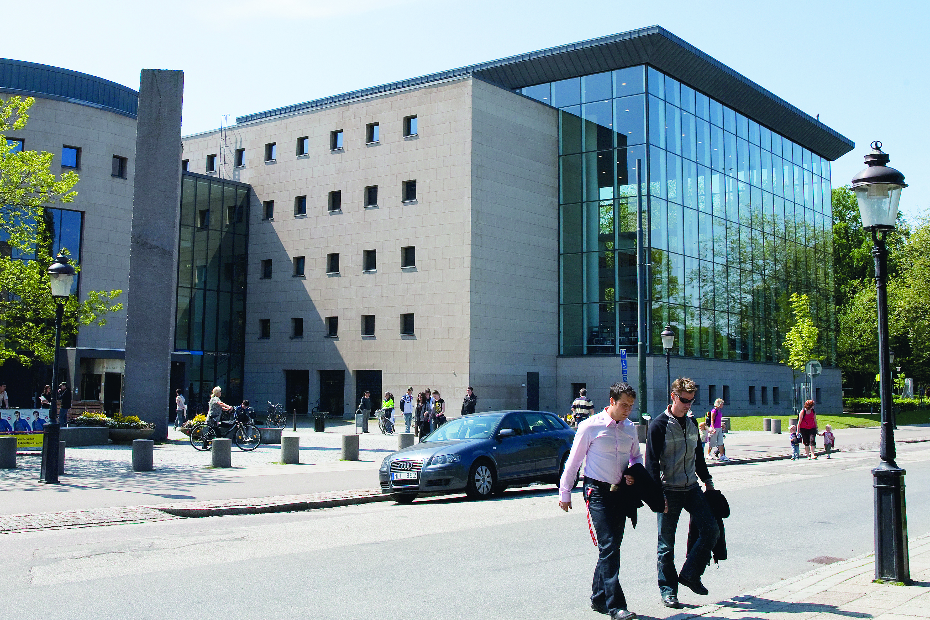 Fastigheter i Malmö ritade av danska arkitekter. Stadsbiblioteket ritat av Henning Larsen Tegnestue A/S. Fotograferat 19 maj 2009 Foto: News Øresund – Jenny Andersson. © News Øresund. Bilden får fritt publiceras under förutsättning att källa anges (Foto: News Øresund + fotografnamn). (The picture can be used freely under the prerequisite that the source is given. ) Originalfil tillhandahålles gratis, kontakta: News Øresund, Malmö, Sweden. News Øresund är en oberoende regional nyhetsbyrå som ingår i projektet Øresund Media Platform som drivs av Øresundsinstituttet i partnerskap med Lunds universitet och Roskilde Universitet och med delfinansiering från EU (Interreg IV A Öresund) och 14 regionala, icke kommersiella aktörer.